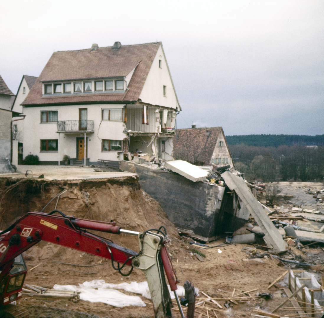 Bruch des Main-Donau-Kanals an der Strecke Nürnberg-Roth am 26. März 1979 oberhalb des Nürnberger Ortsteils Katzwang. Bild vom 27.03.1979.